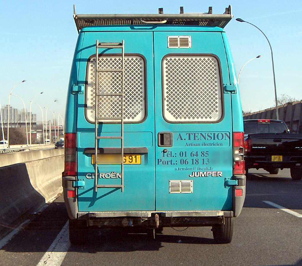 Comme son nom l'indique... Contents 1 Summary 1.1 Légende 1.2 Auteur 1.3 Description technique 1.4 Source 1.5 Statut 2 Licensing 3 Original upload log Summary Son nom lui a donné l'idée ? Légende Sans commentaire... Auteur Photographie effectuée par ©éréales Kille® ⌨ ☺ - 15 mars 2005, autoroute A6a, 9 h 32. Description technique Photographie prise avec un appareil numérique HP Photosmart R707 5,1 MPx. f/4,8, 1/272 s, ISO 100 Source Archives personnelles. Statut César Alexanian